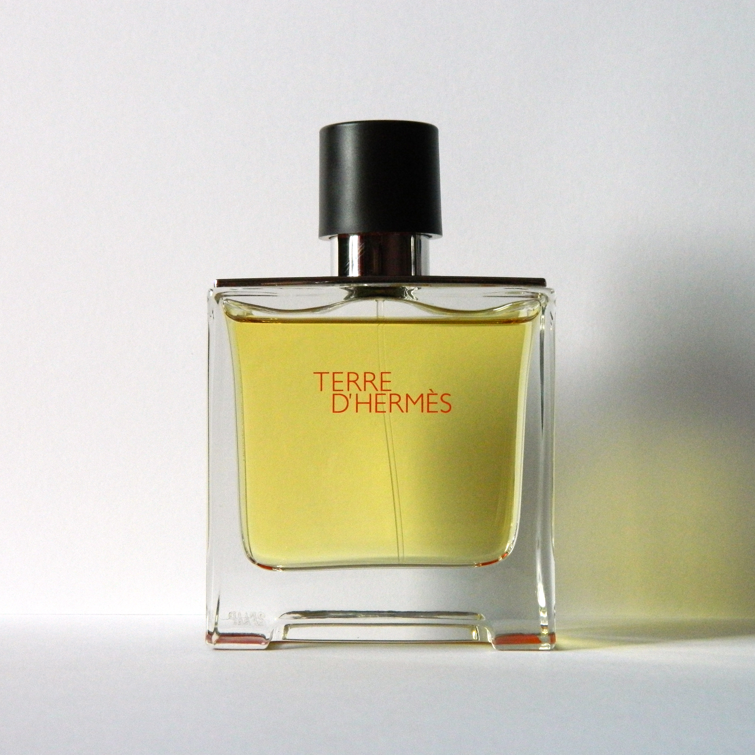 Фотография флакона Terre d’Hermès в концентрации духи